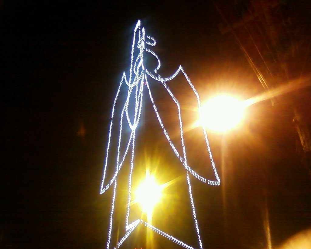 ángel de amparo